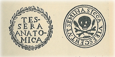 Adgangsbilletter til det anatomiske teater. Efter afbildning i Th. Bartholins "Domus Anatomica". Indskrifterne lyder oversat fra latin:Anatomisk billet - De tørre ben skulle grønnes lig sæd. Entrance tickets for the Danish Anatomical Theatre from the 17th century.